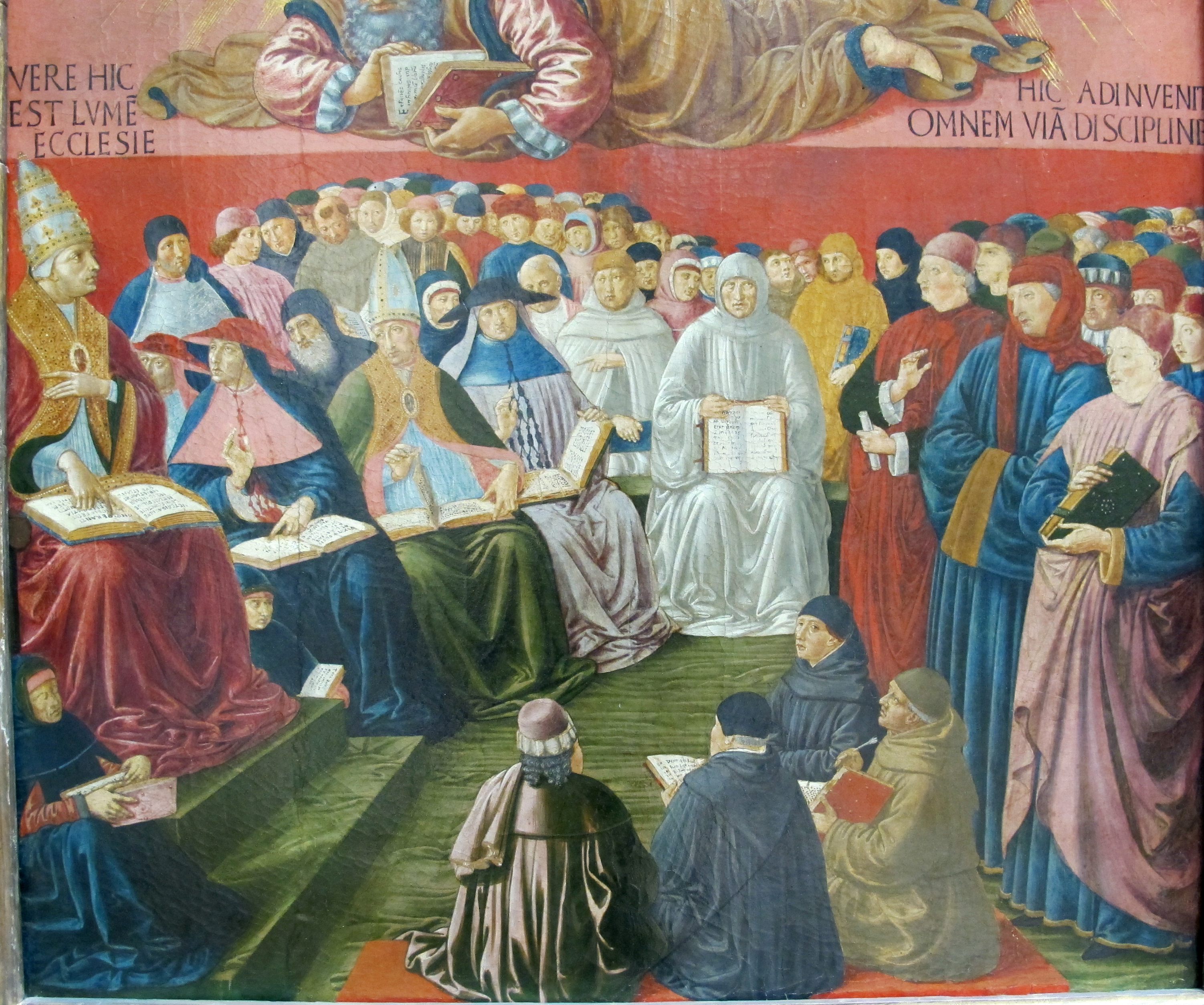 Pittura del Quattrocento italiano al Louvre